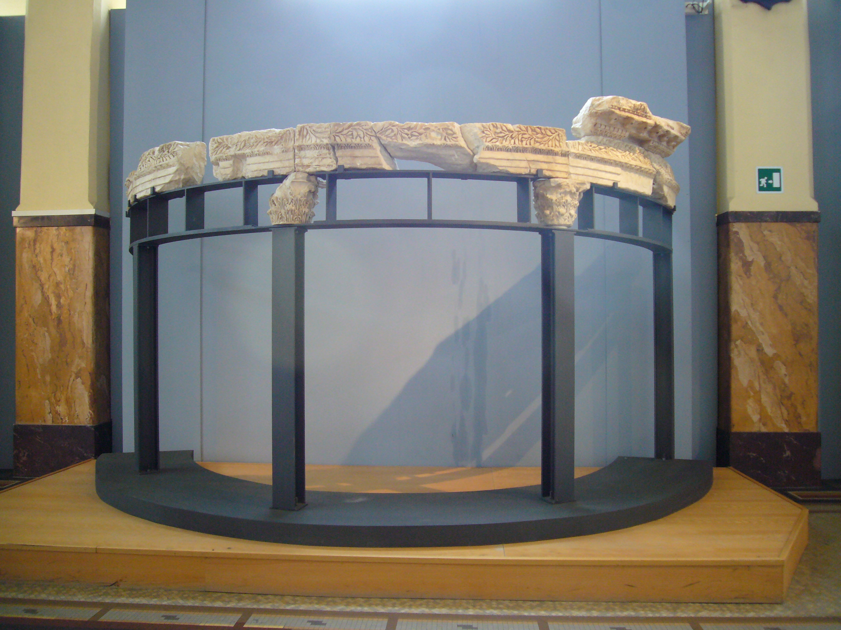 Roma, Centrale Montemartini: trabeazione dell'edificio rotondo pertinente al tempio di Apollo Sosiano Centrale Montemartini Native nameCentrale MontemartiniLocationRome, ItalyCoordinates41° 52′ 00.48″ N, 12° 28′ 41.12″ E Established2005Web page control : Q1054090 VIAF: 268486794 GND: 10105941-3 institution QS:P195,Q1054090